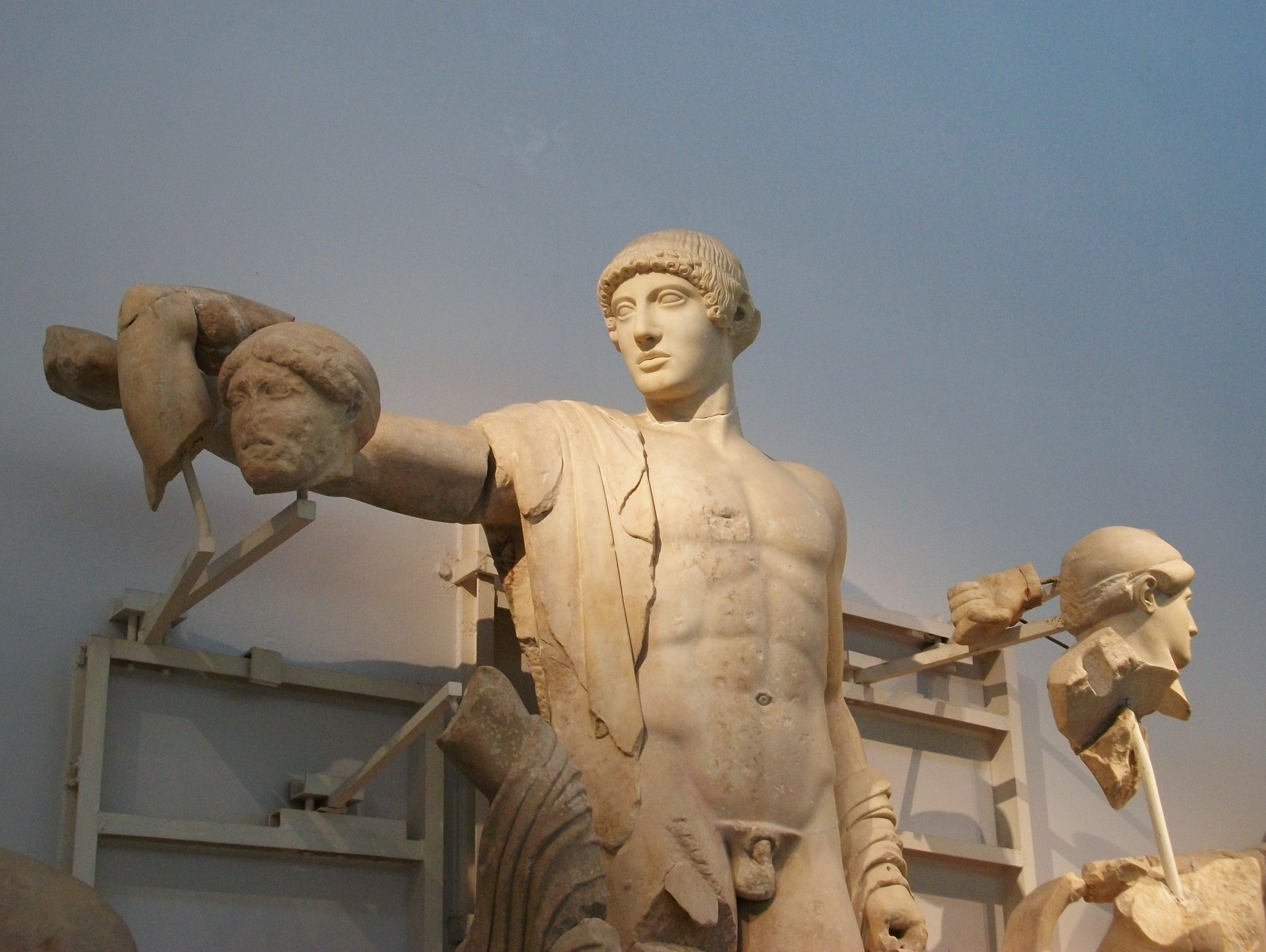 Detall de l'Apol·lo del frontó occidental del temple de Zeus, Museu Arqueològic d'Olímpia.